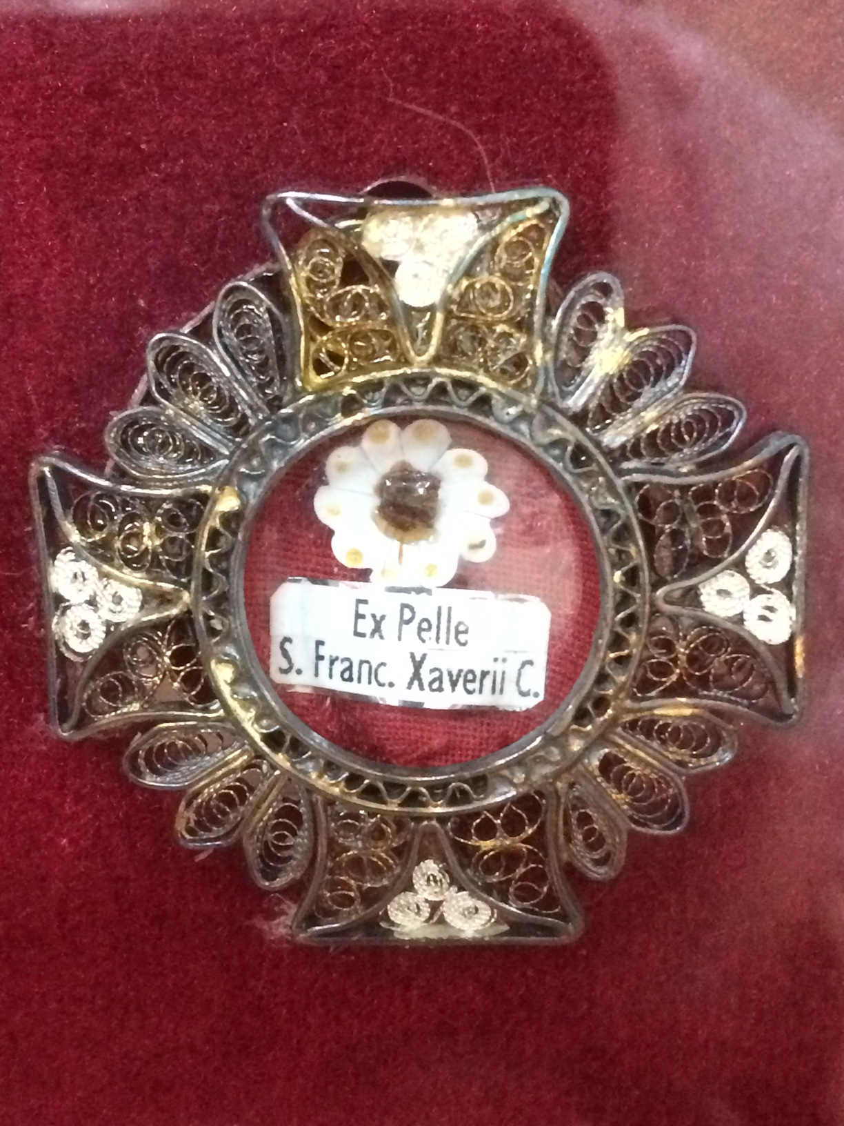 聖フランシスコ ザビエル聖遺物（右腕の一部） relic of St. Francis Xavier